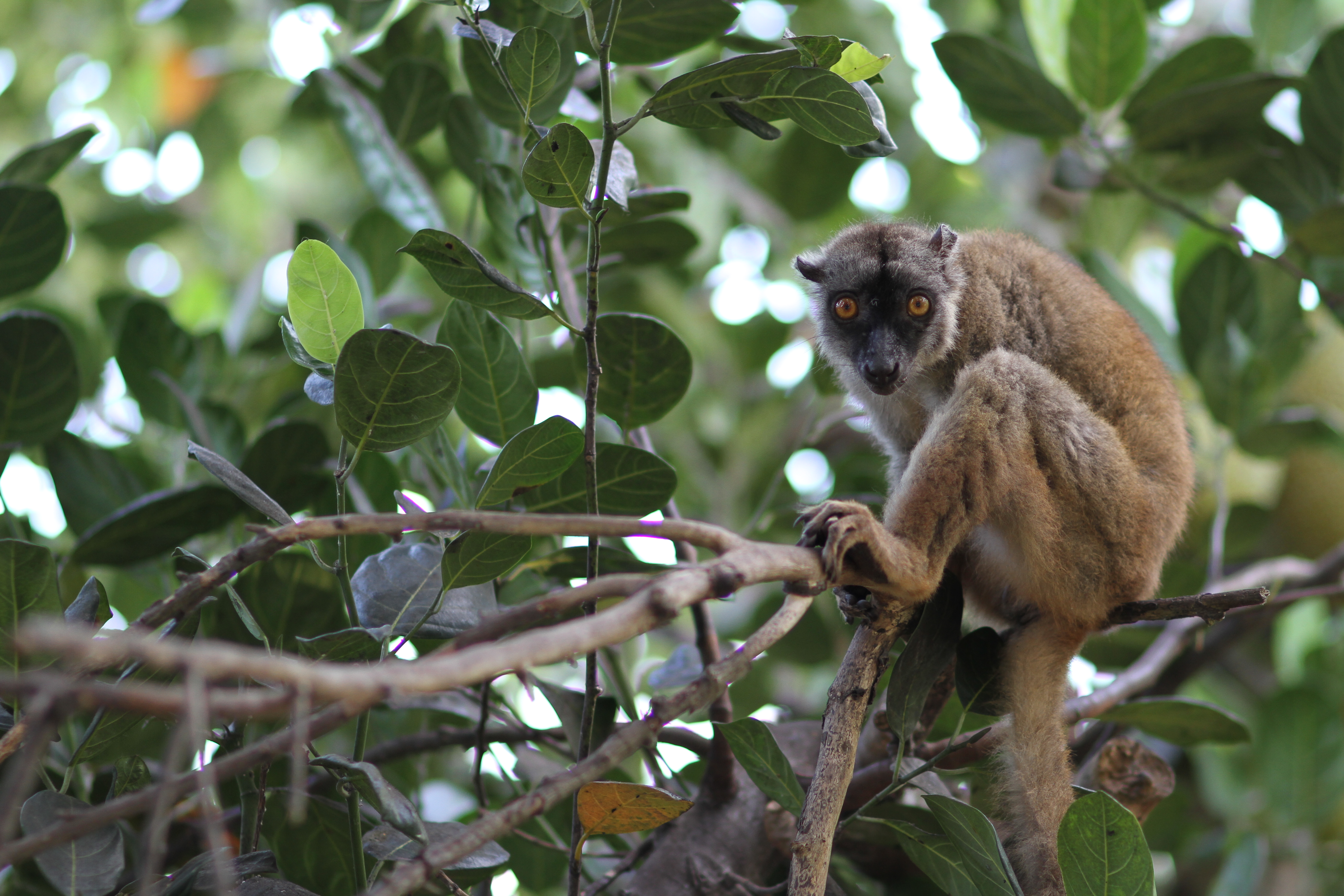 Maki de Mayotte